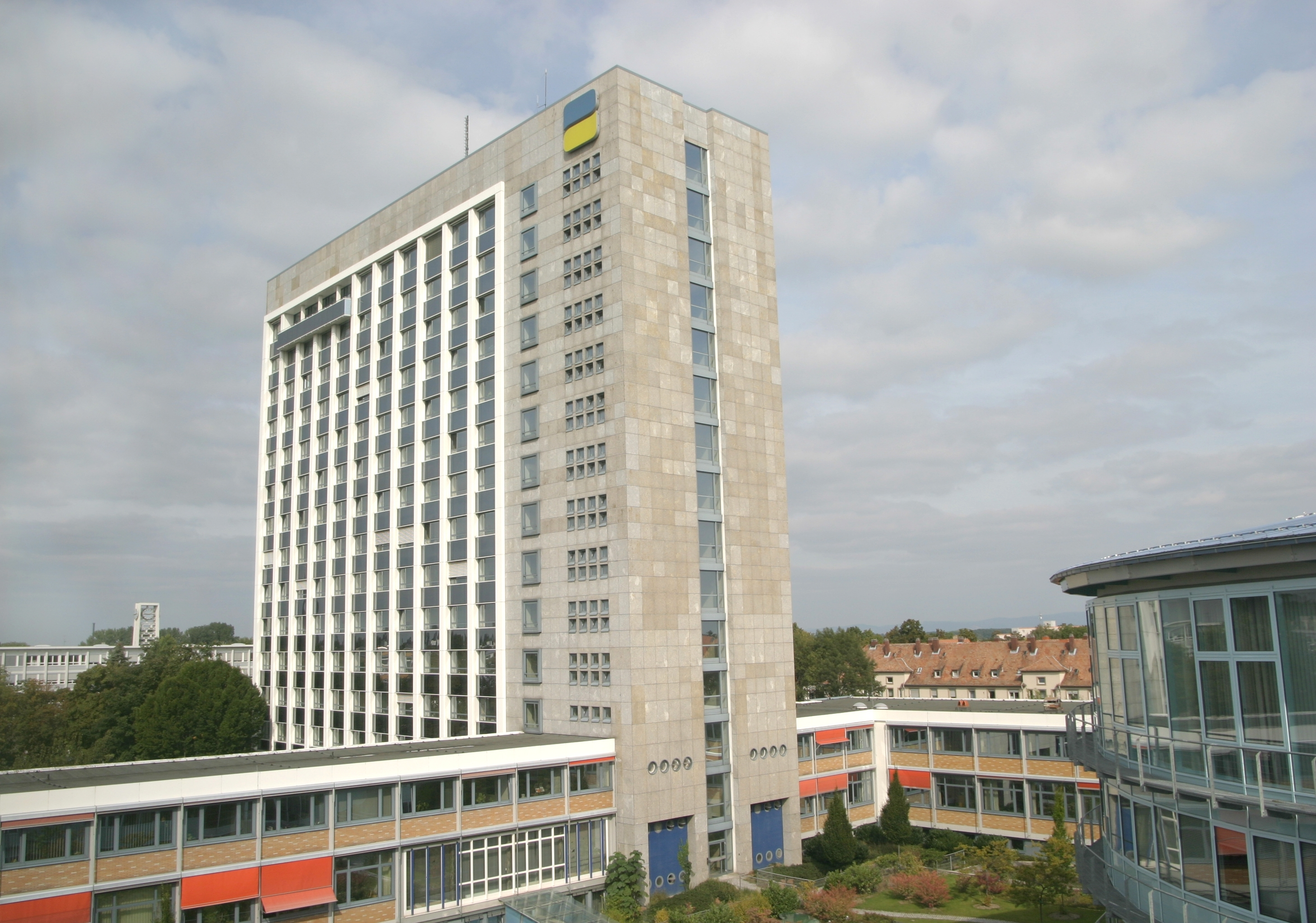 Deutschen Rentenversicherung Rheinland-Pfalz . Blick vom Erweiterungsbau.